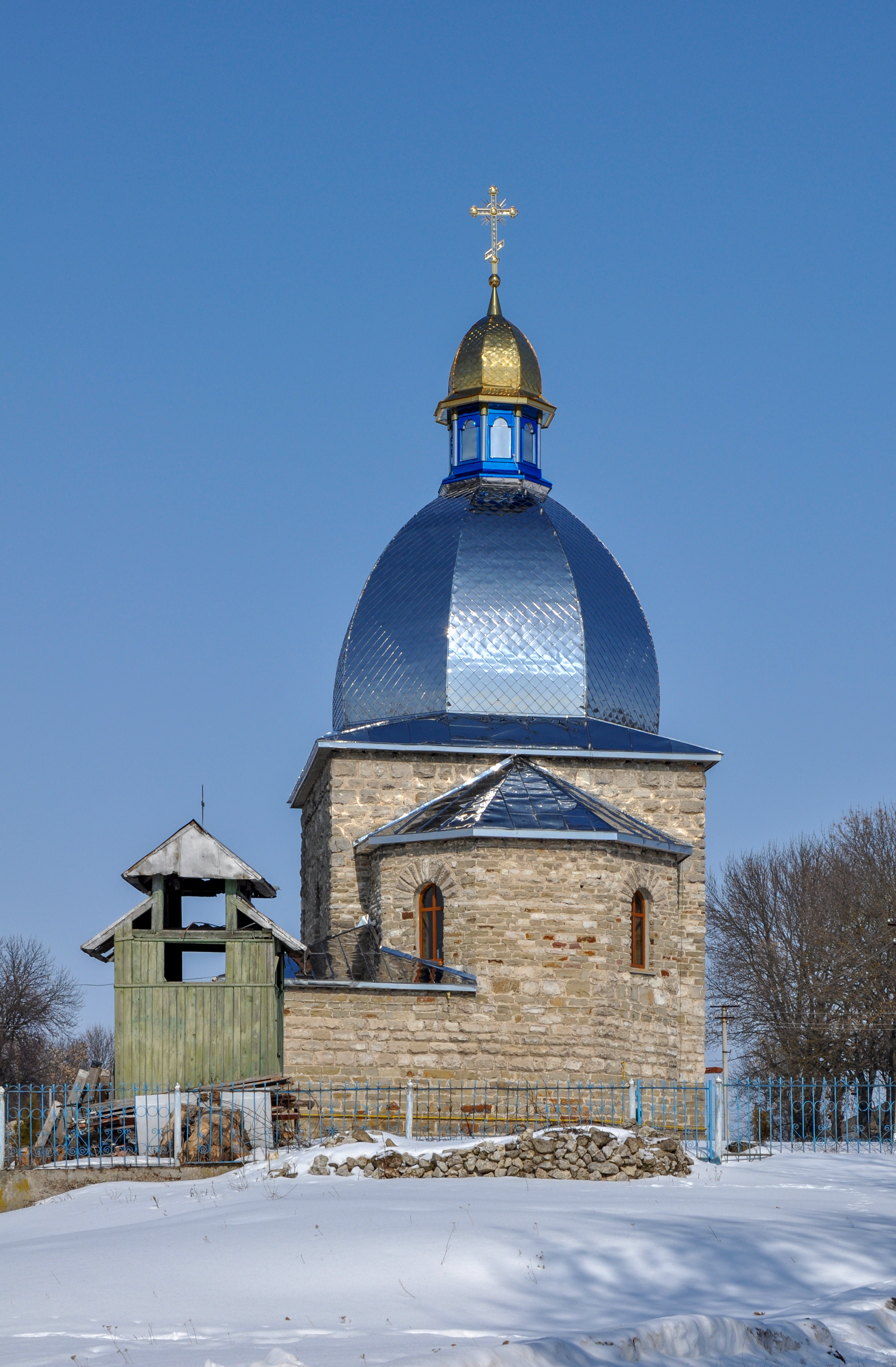 Церква Св. Петра і Павла (мур.), Дорофіївка